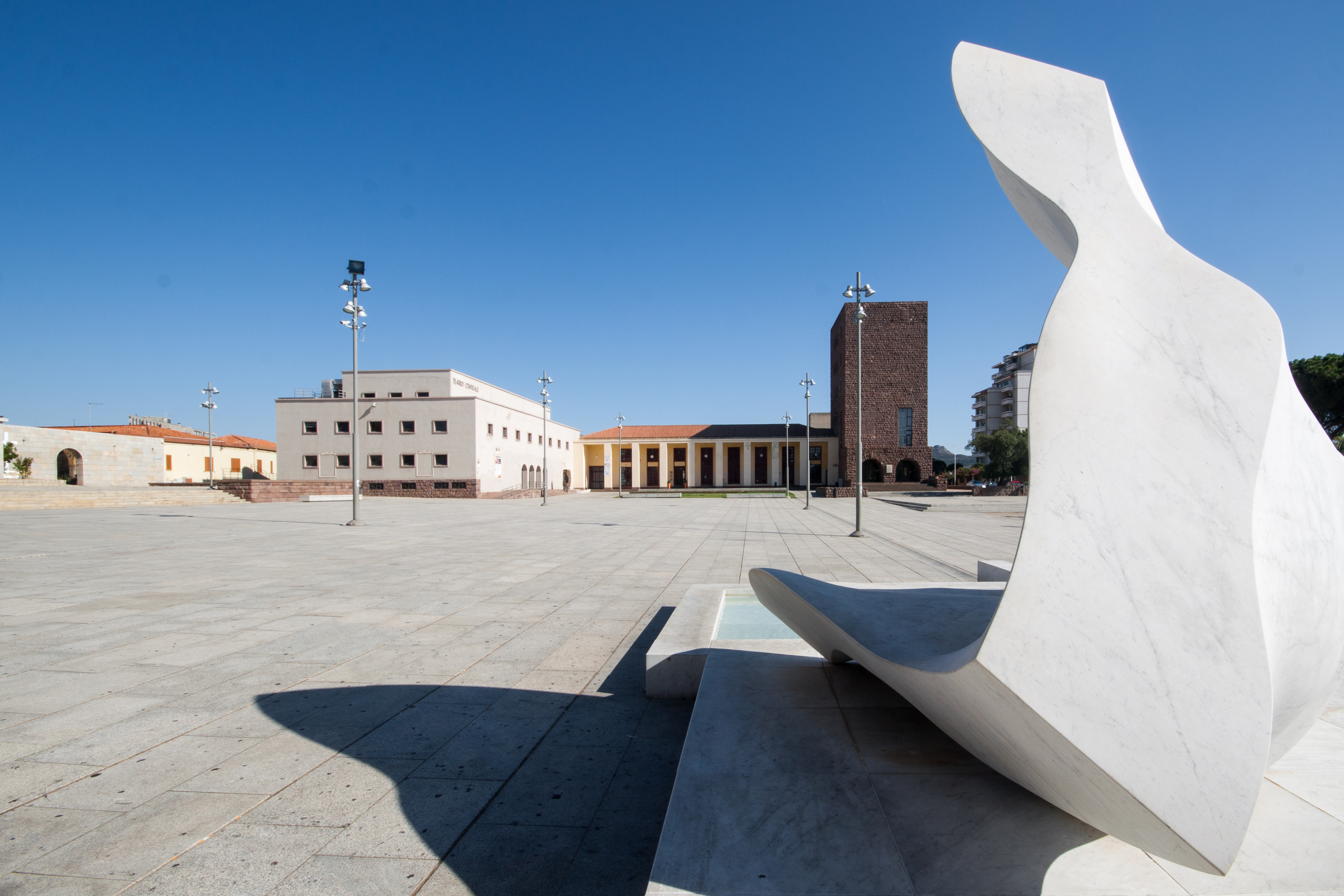 Piazza Roma This is a photo of a monument which is part of cultural heritage of Italy.